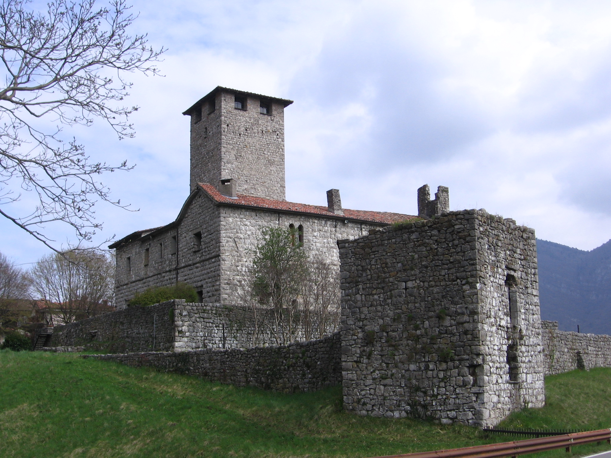 Bianzano, Bergamo, Italia